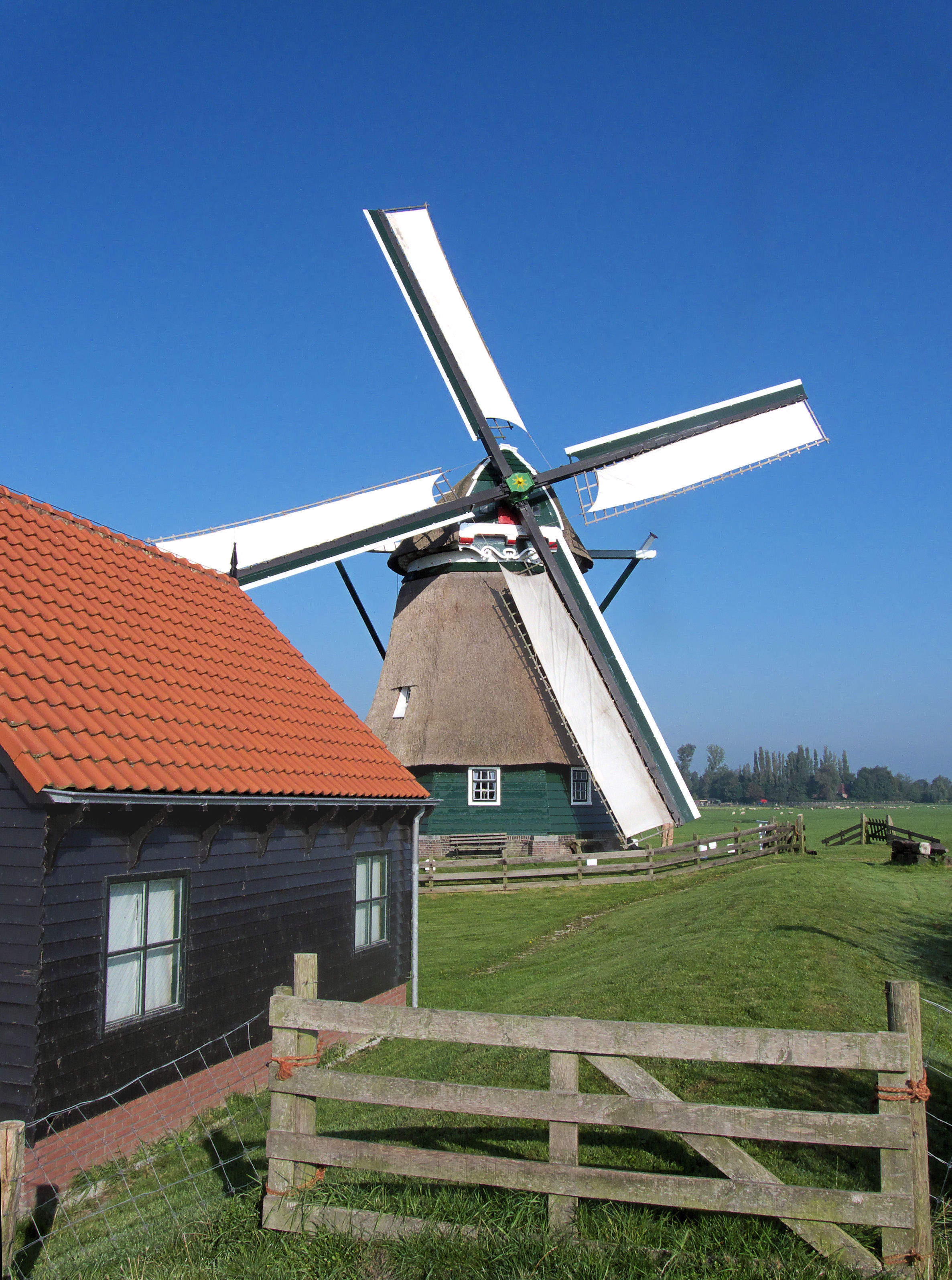 Dorregeestermolen met links electrisch gemaal